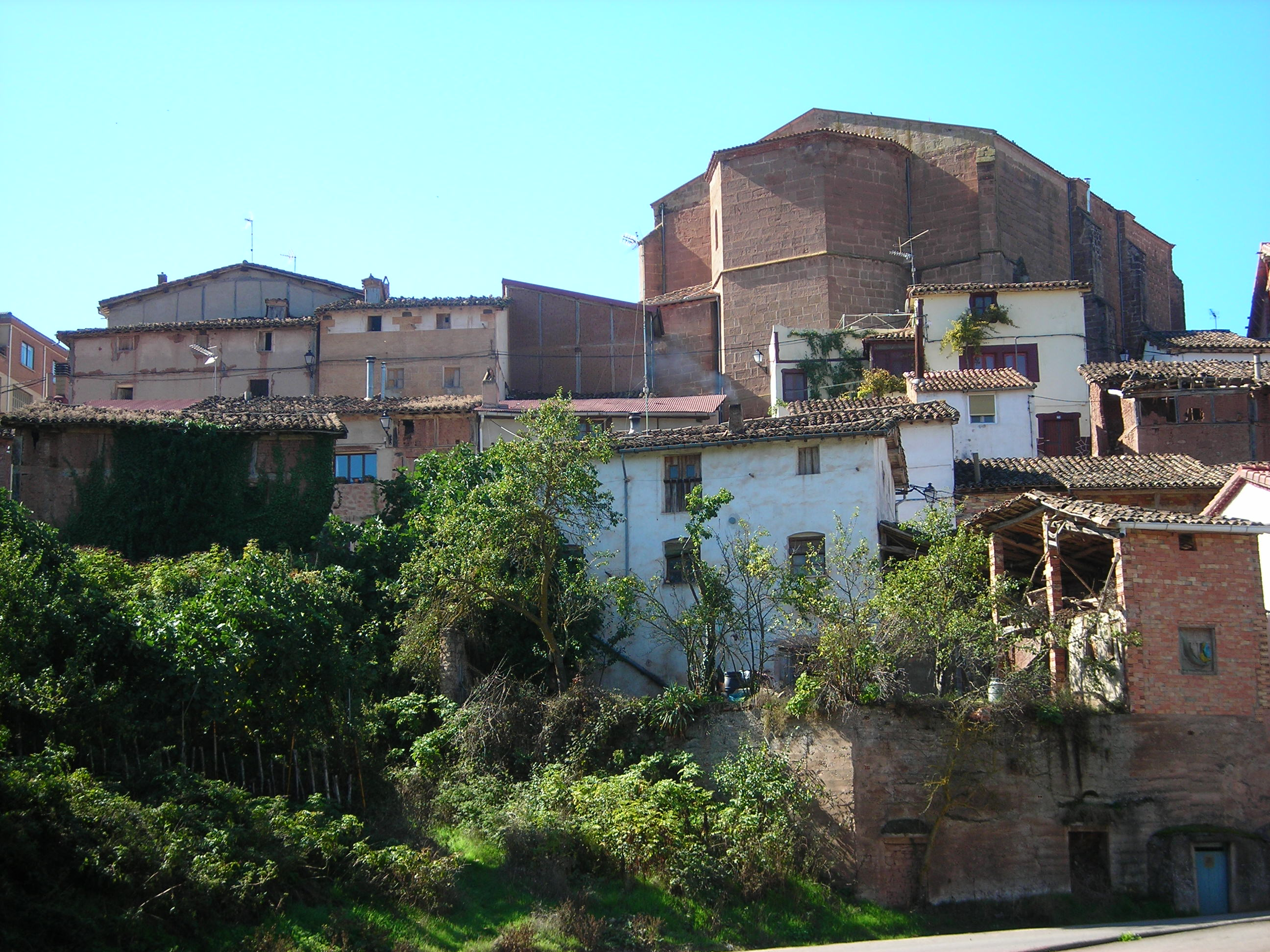 Vista de Camprovín desde 'Los Pilones'